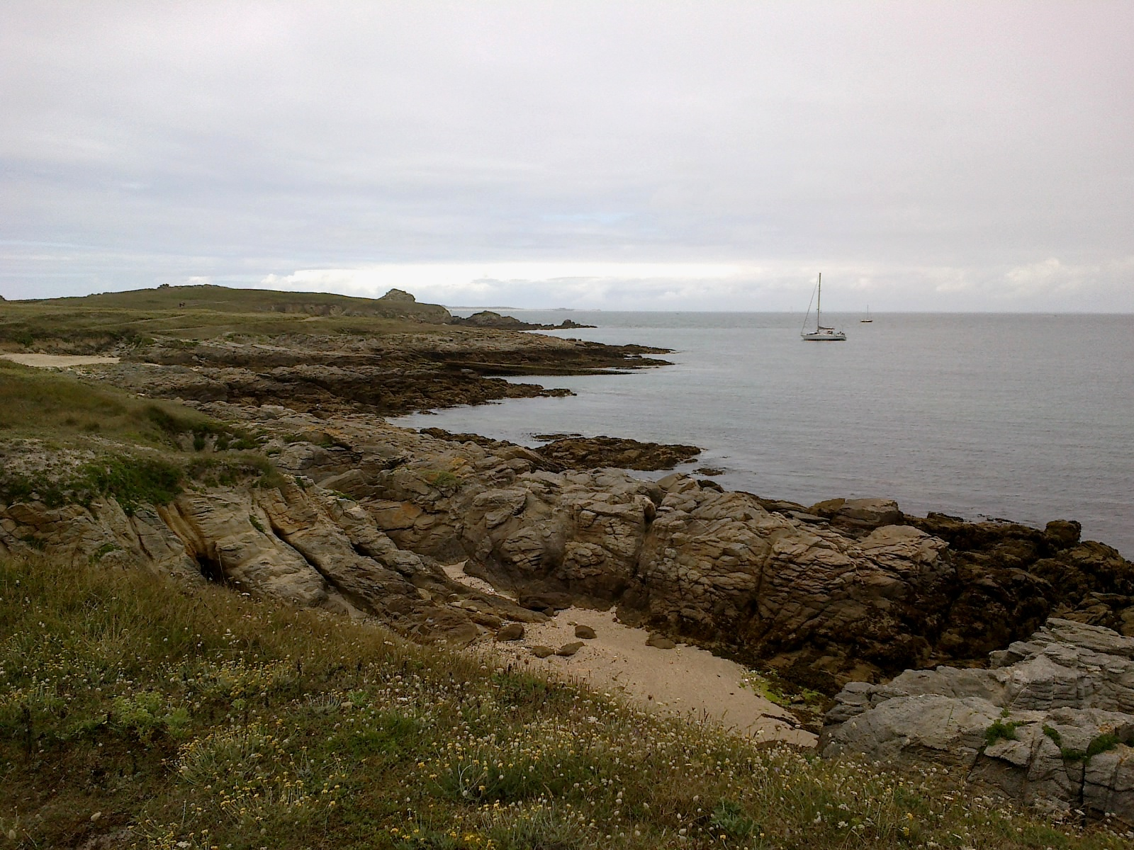 Hoedic Pointe Vieux-Chateau